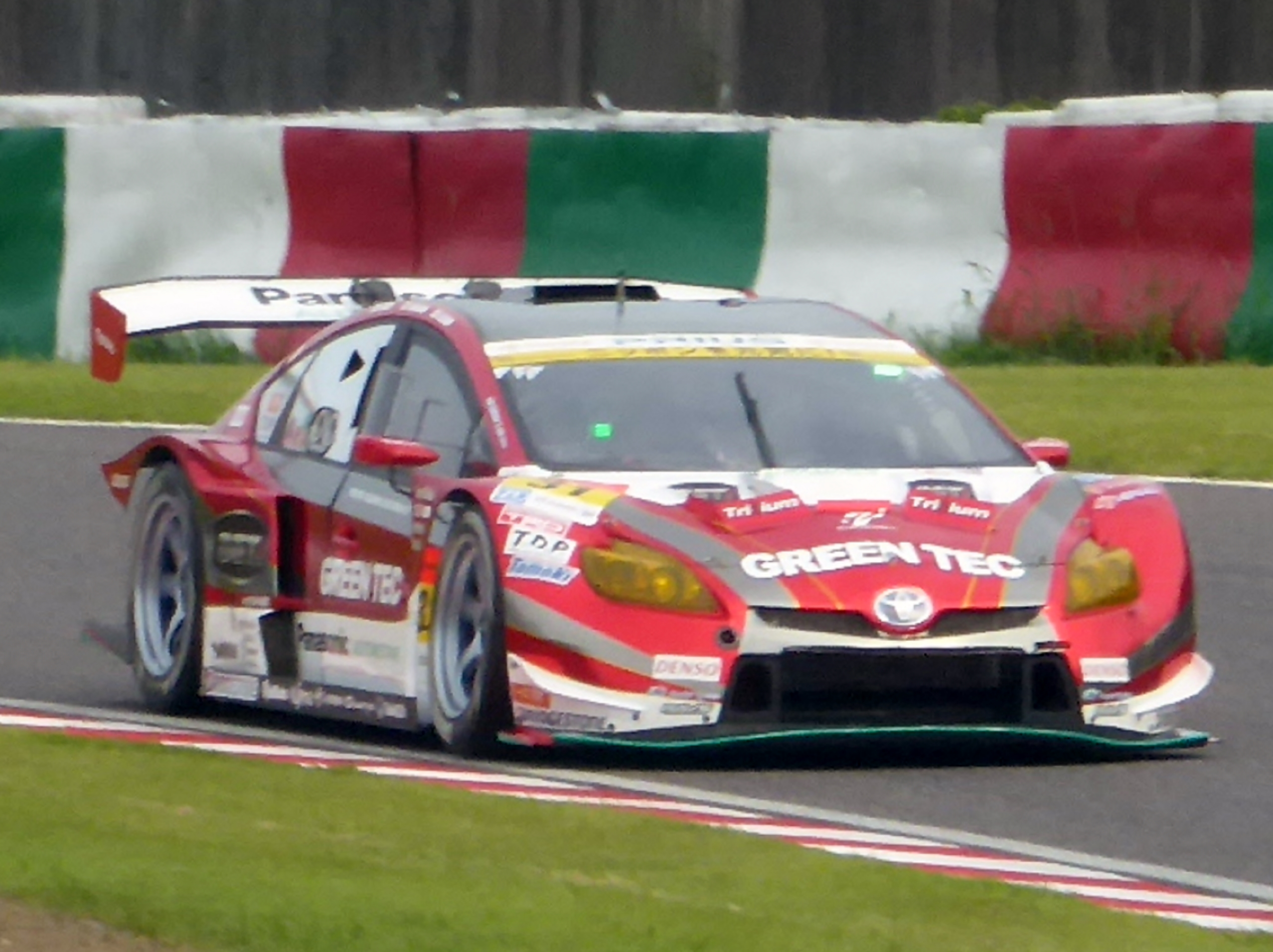 2015年鈴鹿1000㎞において31号車TOYOTA PRIUS apr GTを撮影。